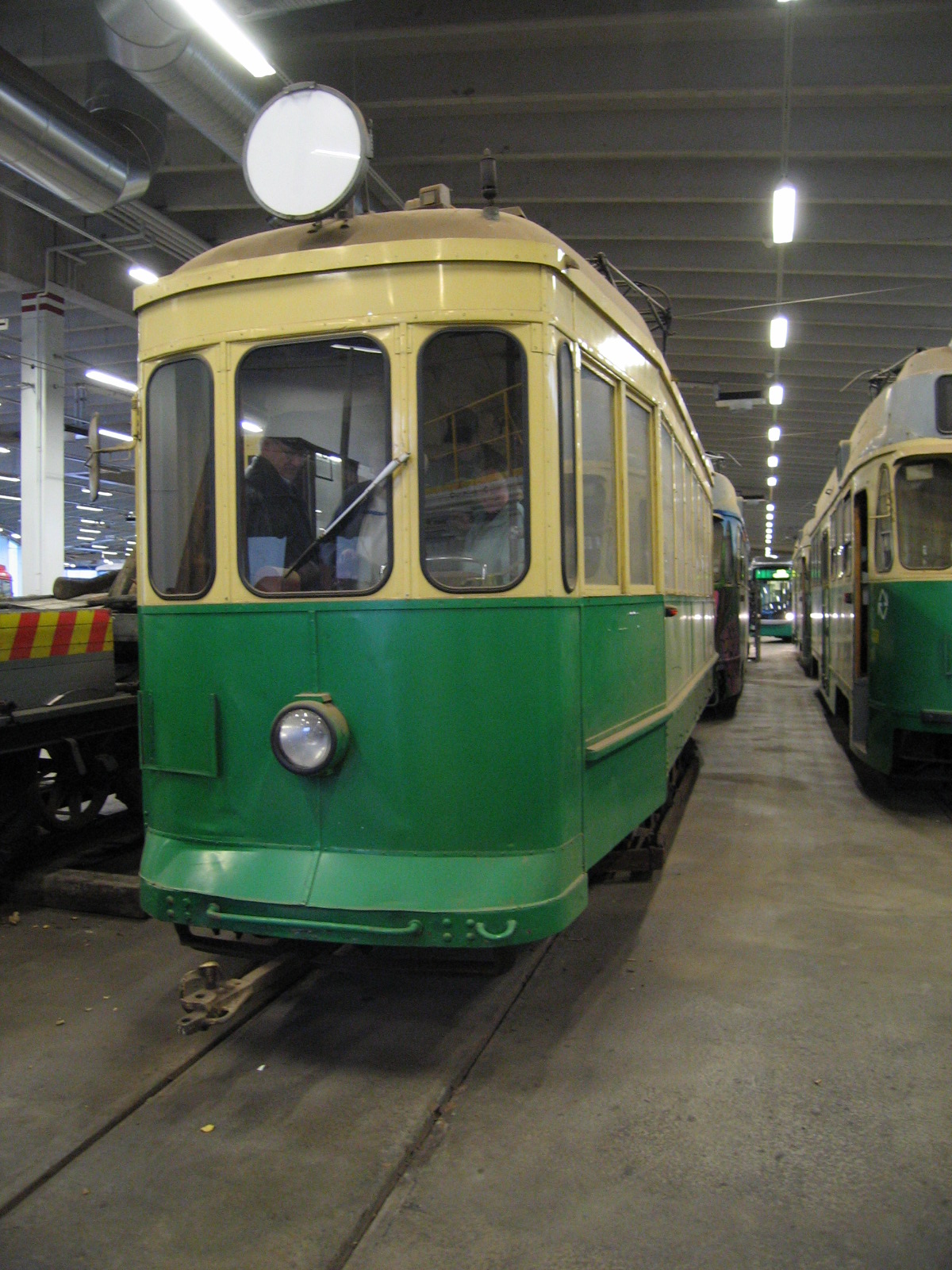 Old tram in Helsinki, Finland